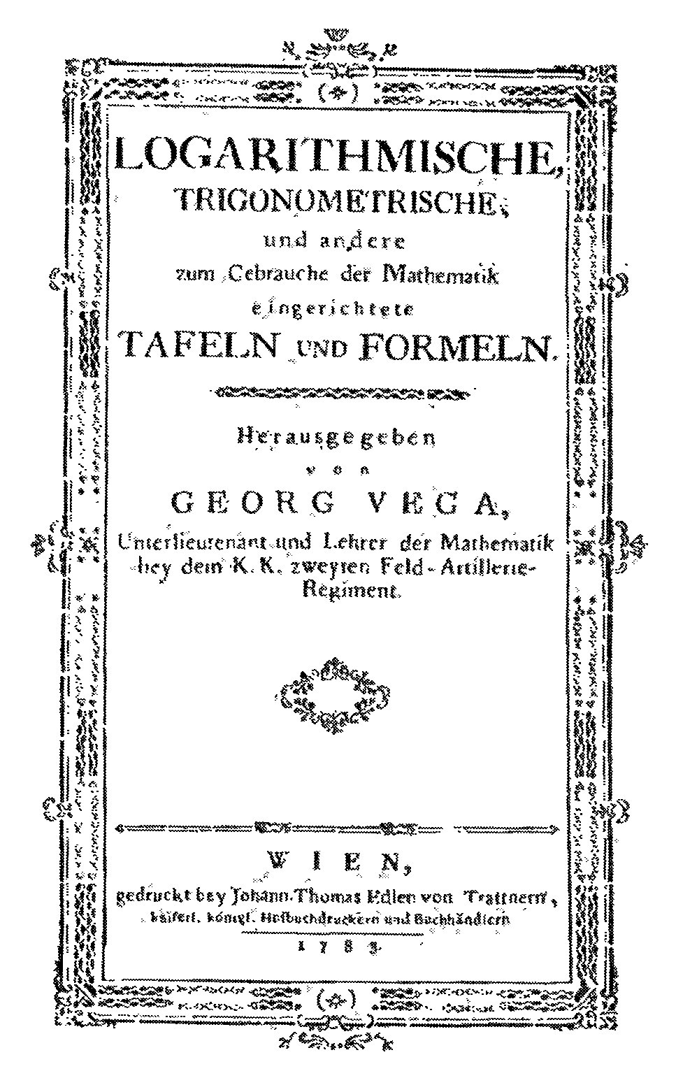 Титульный лист сборника семизначных логарифмических таблиц Георга Веги